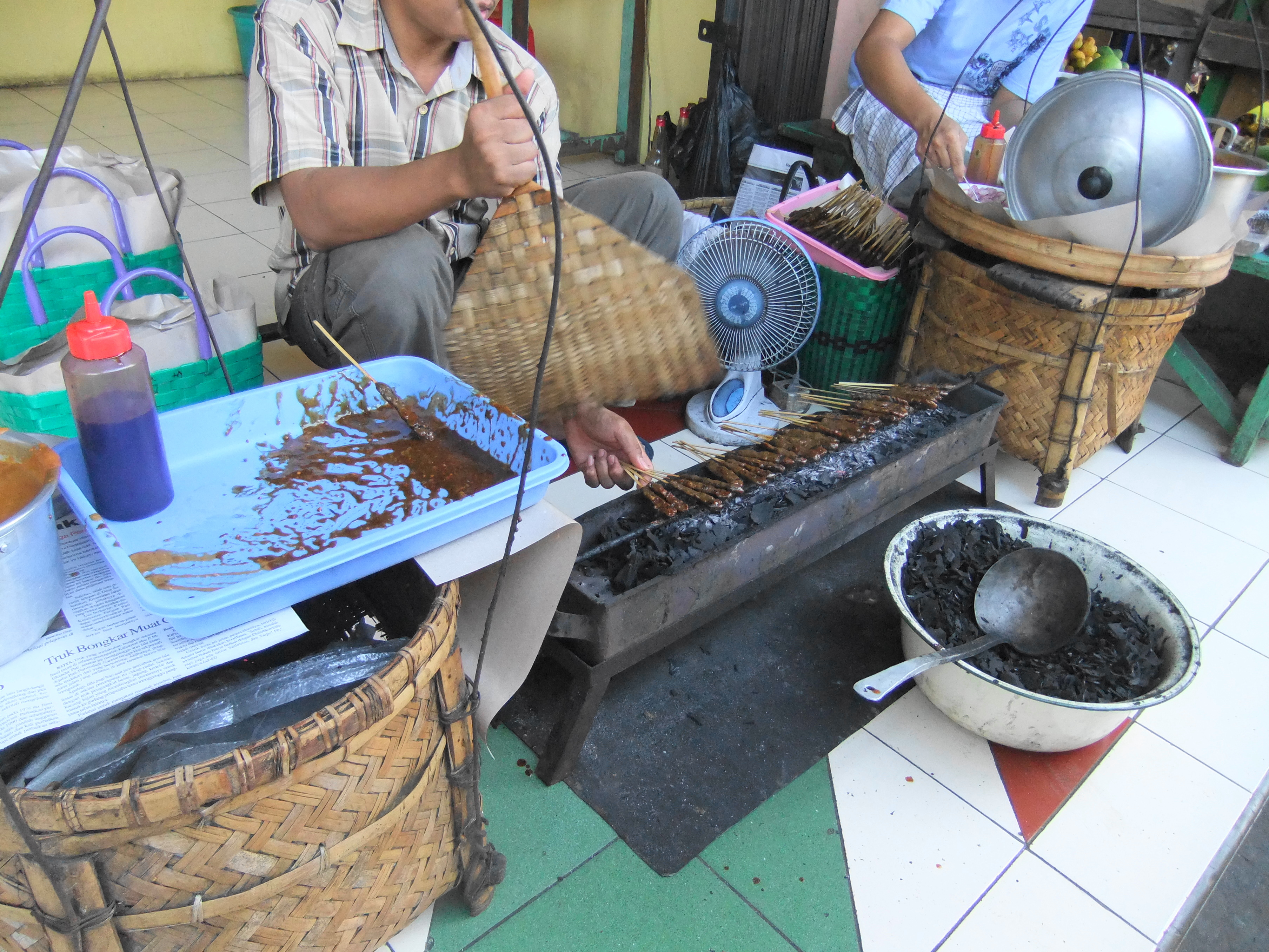 Sate kerbau/sapi, Jepara